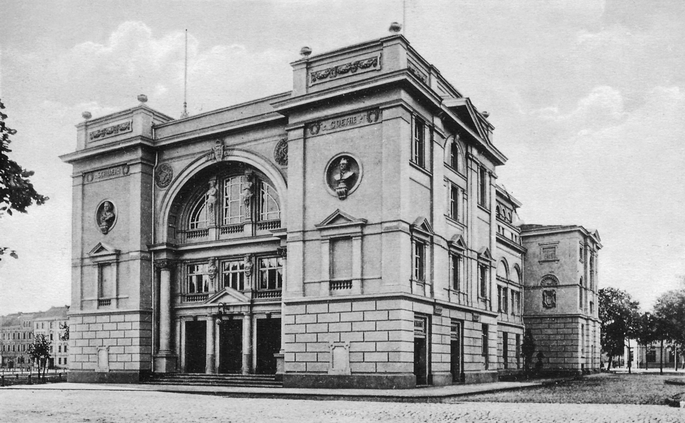 Тильзитский театр